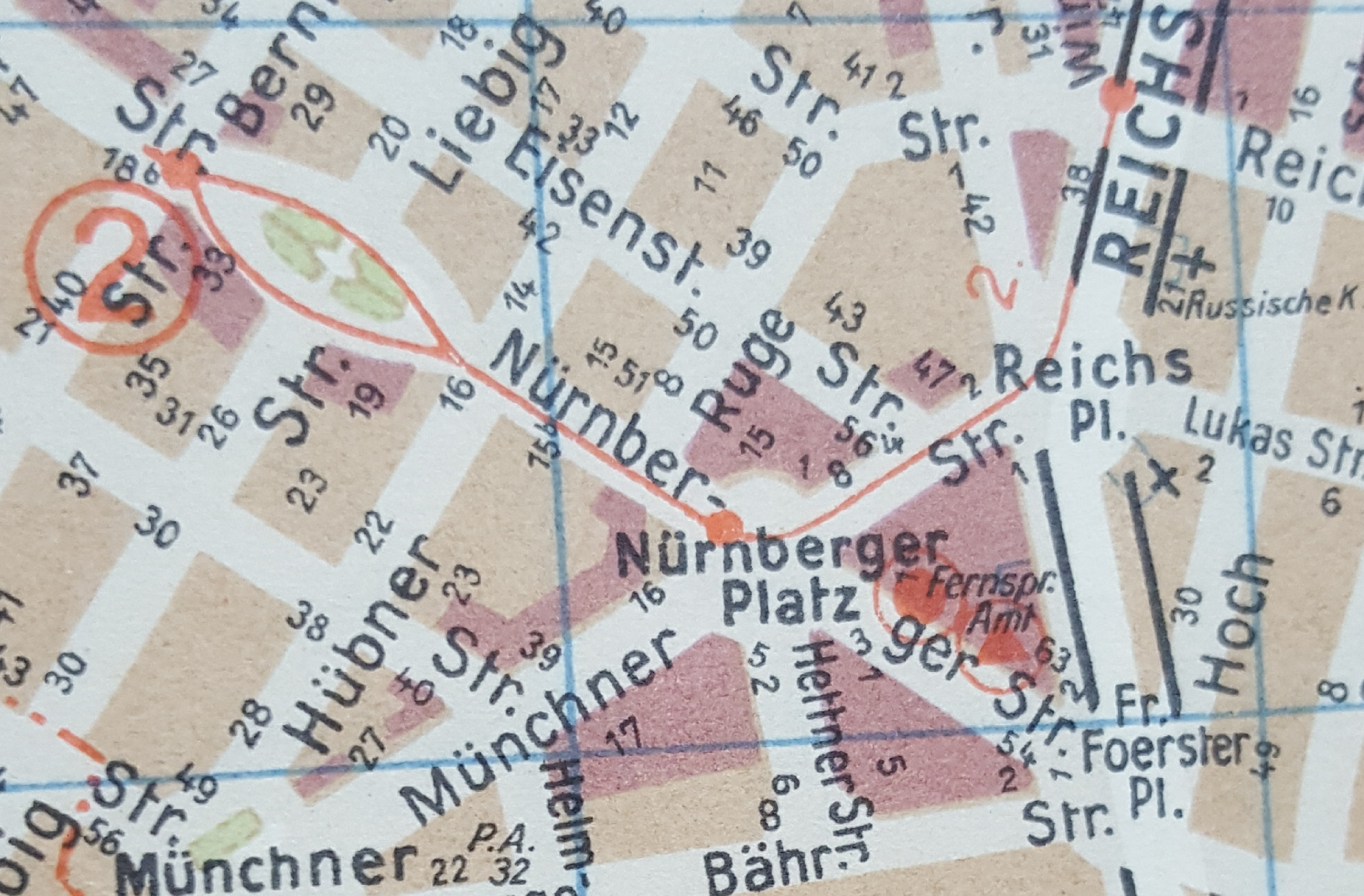 Südvorstadt, Nürnberger Platz, Stadtplan Dresden von 1948, die lila eingefärbten Gebiete stellen totale Zerstörung dar. Kartenausschnitt